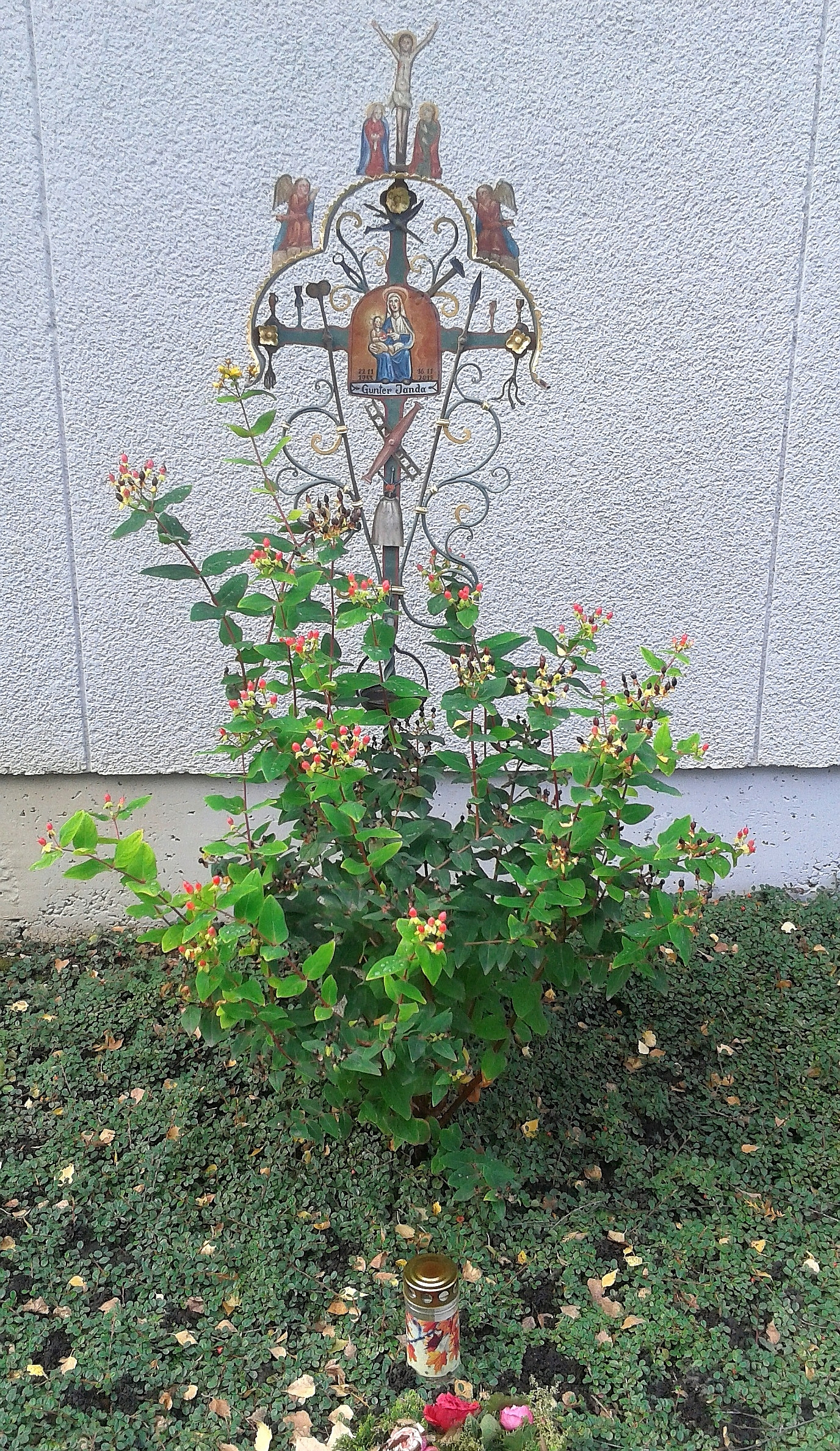 St. Barbara-Friedhof Linz, Grab von Monsignore Gunter Janda in der Priestergrabstätte der Diözese Linz